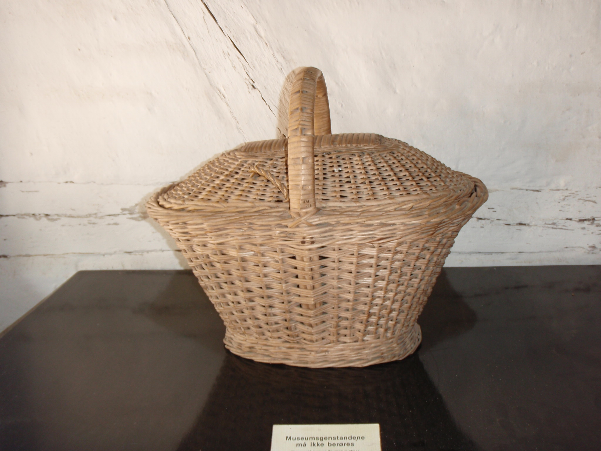 Billede taget på Wiki-fotodag juni 2012. Frilandsmuseet.